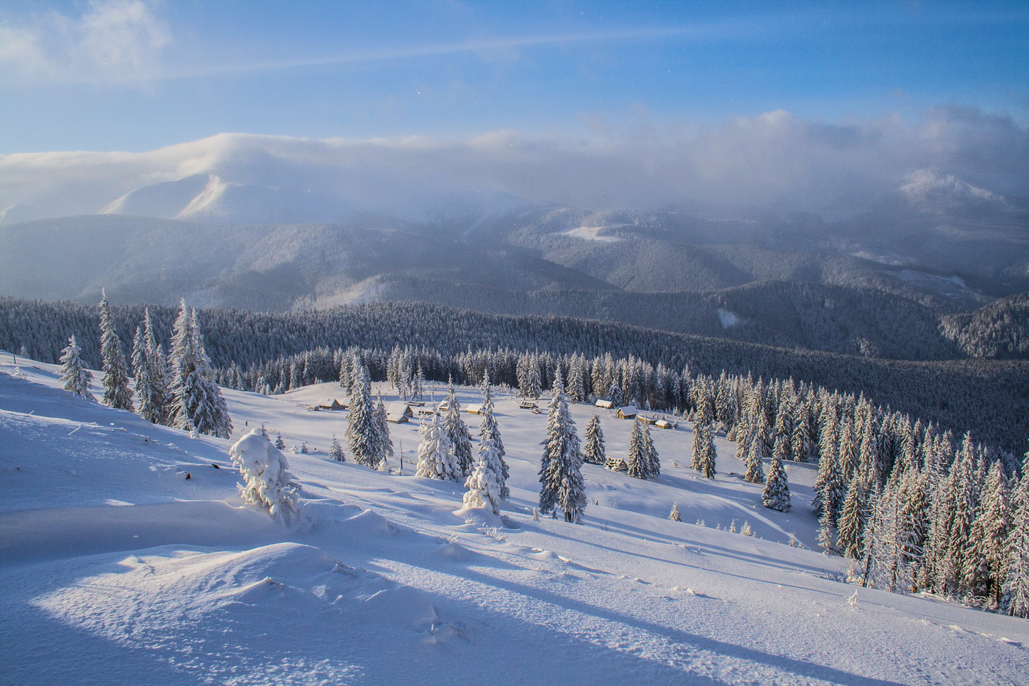 Зимовий день на Кукулі.